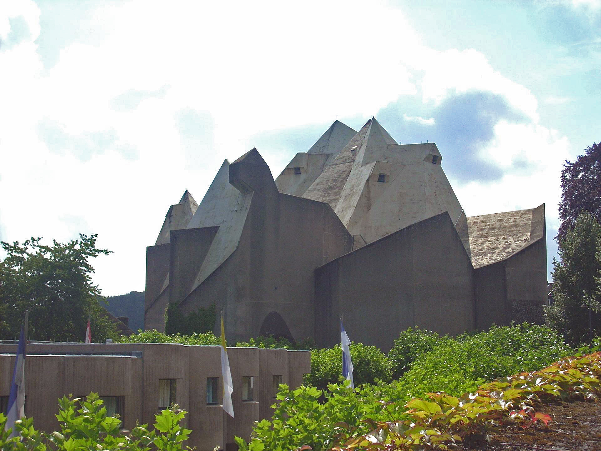 Velbert-Neviges, Mariendom